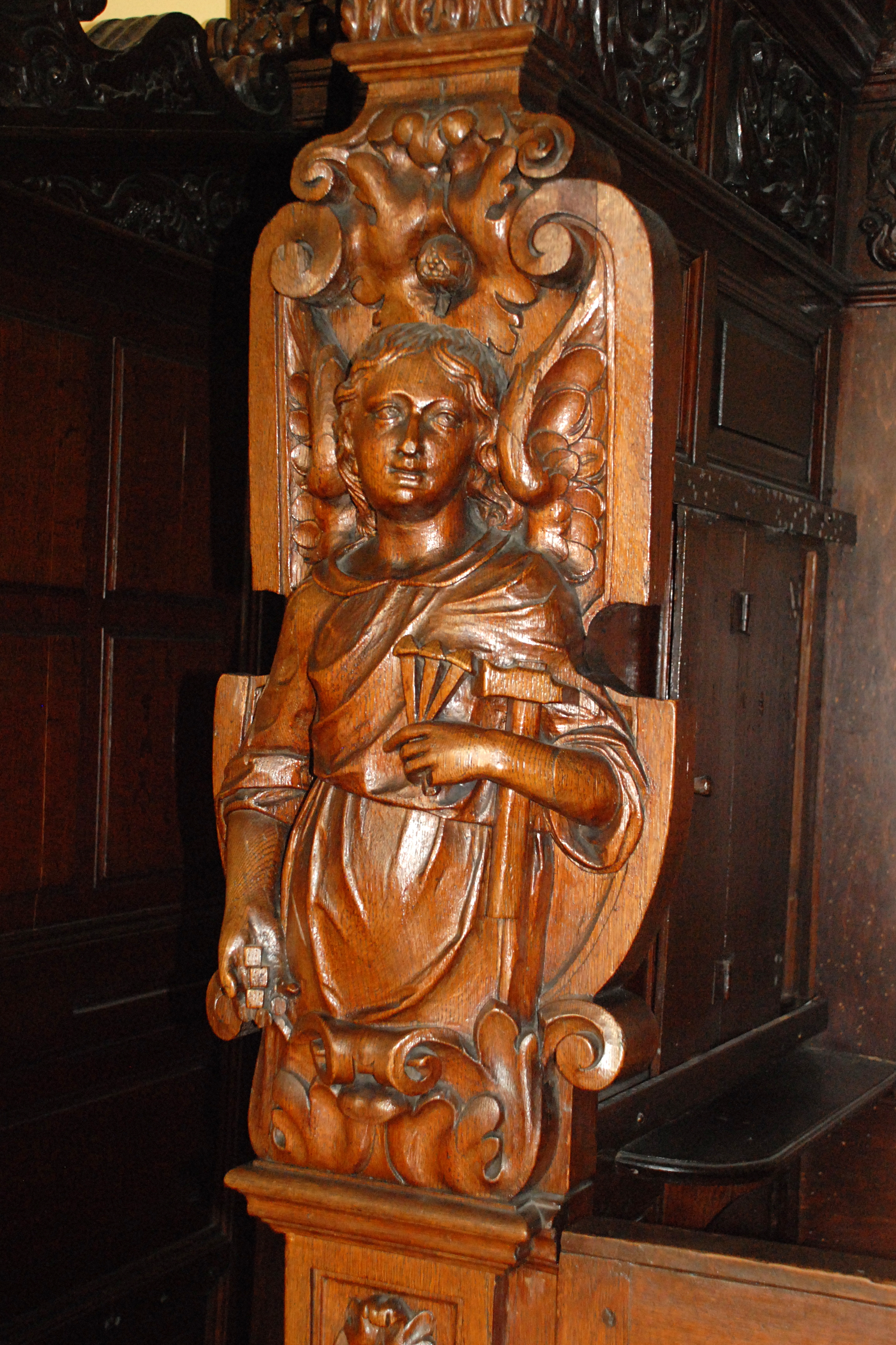 Belgique - Brabant wallon - Mont-Saint-Guibert - Église Saint-Guibert - Confessionnaux